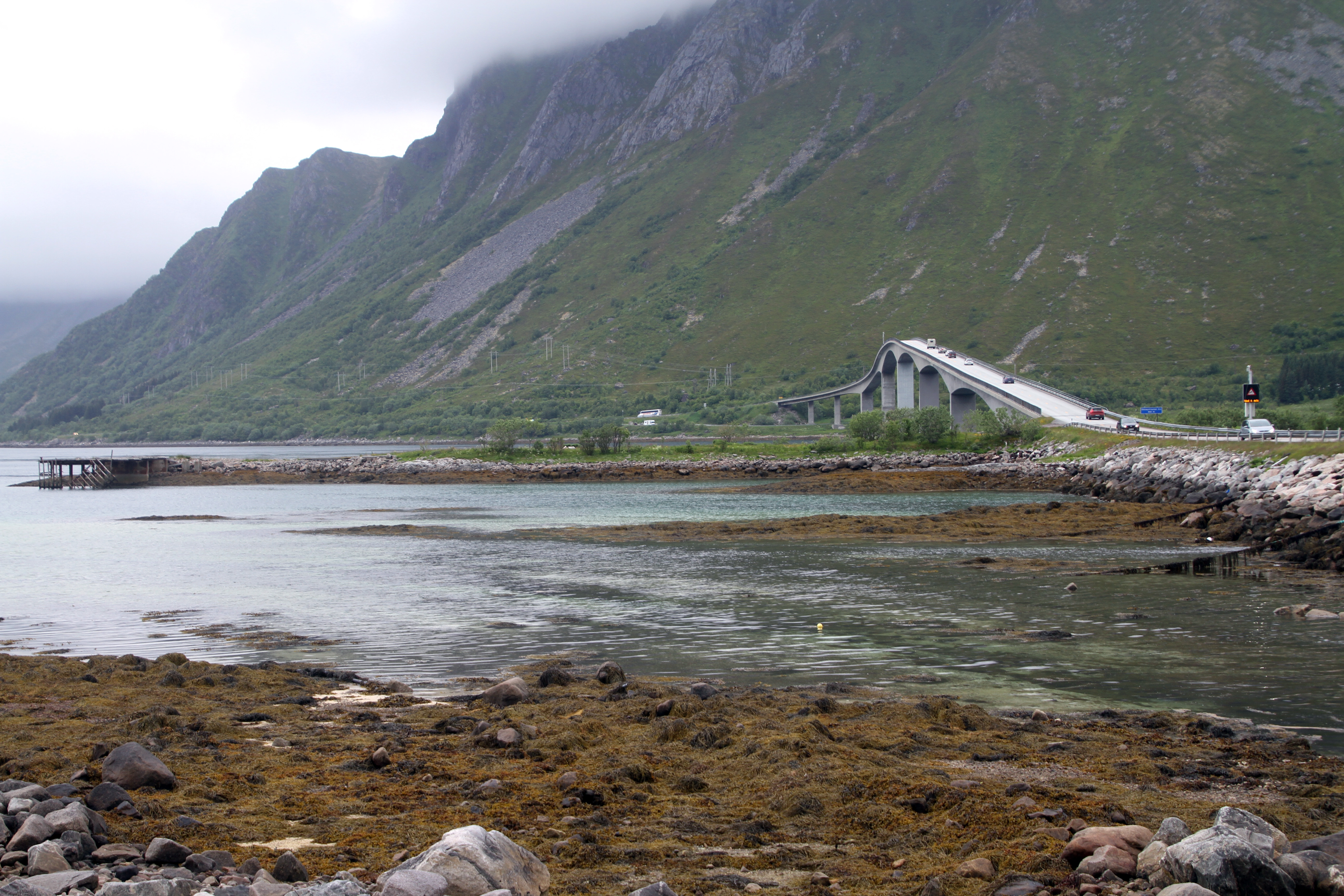 Gimsøystraumen-Bruecke zwischen Austvågøy und Gimsøy (Lofoten, Norwegen)